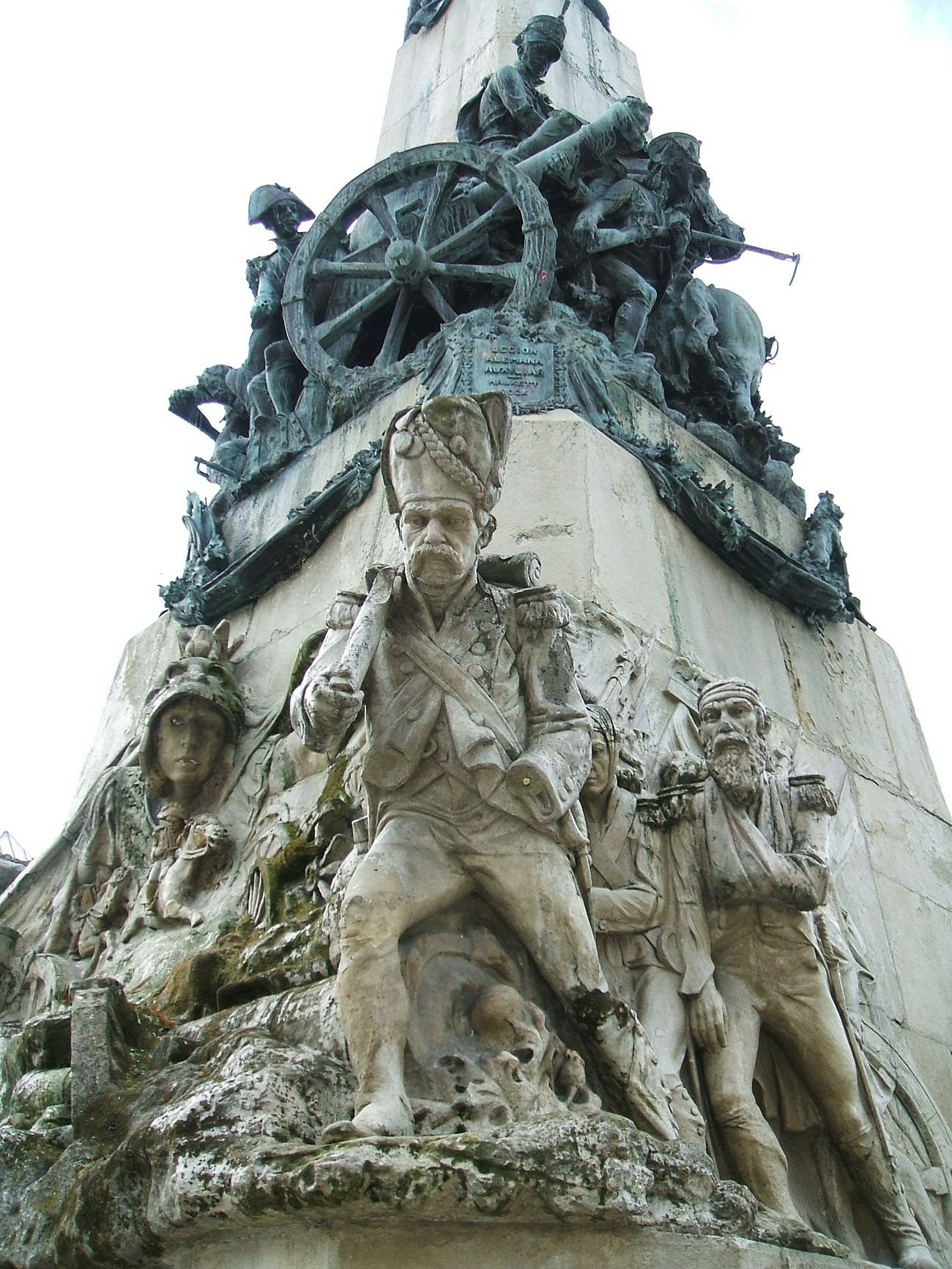 Monumento a la Batalla de Vitoria (1813), en la Plaza de la Virgen Blanca de Vitoria-Gasteiz, País Vasco, España